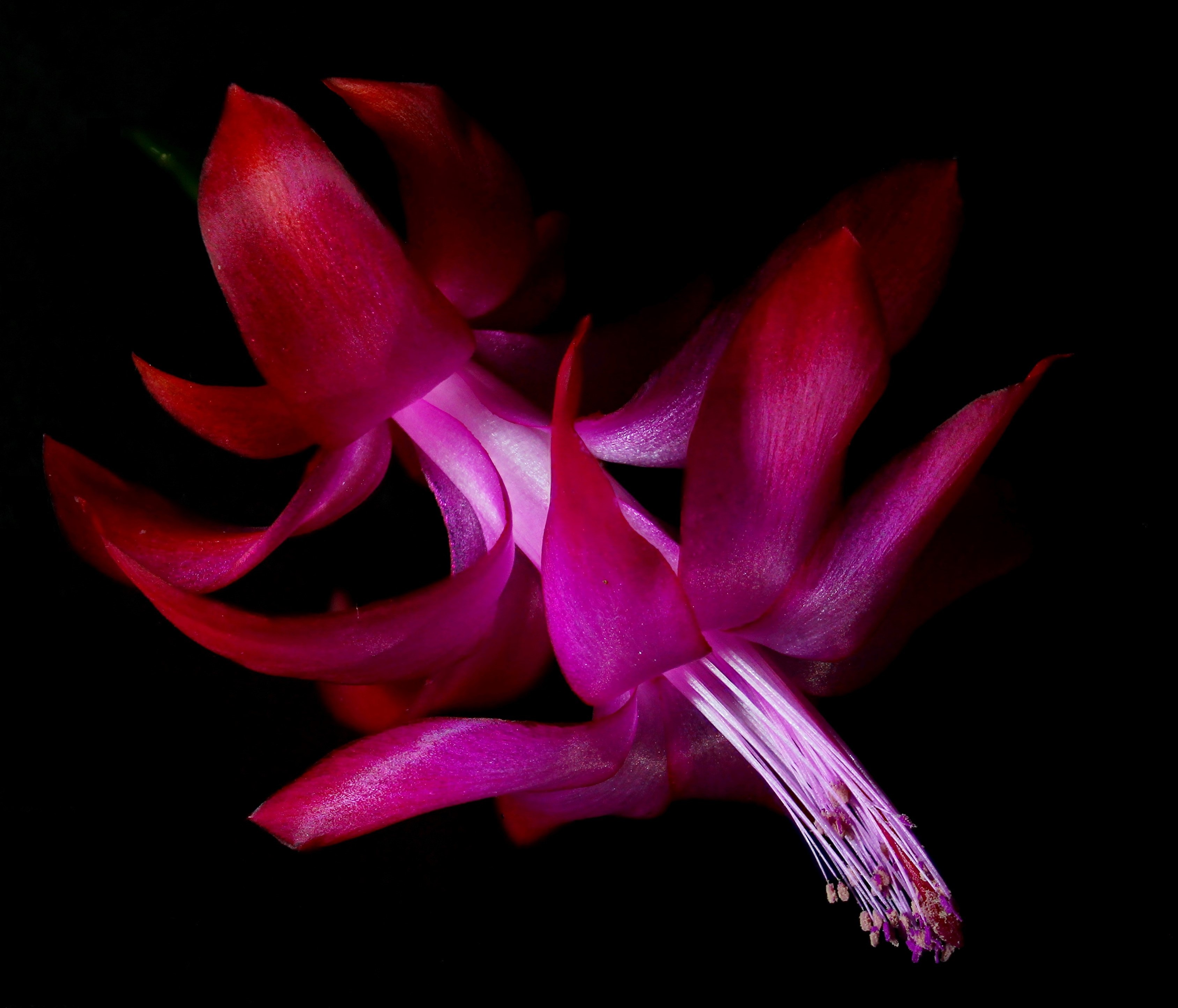 Екземляр утримувався в домашніх умовах